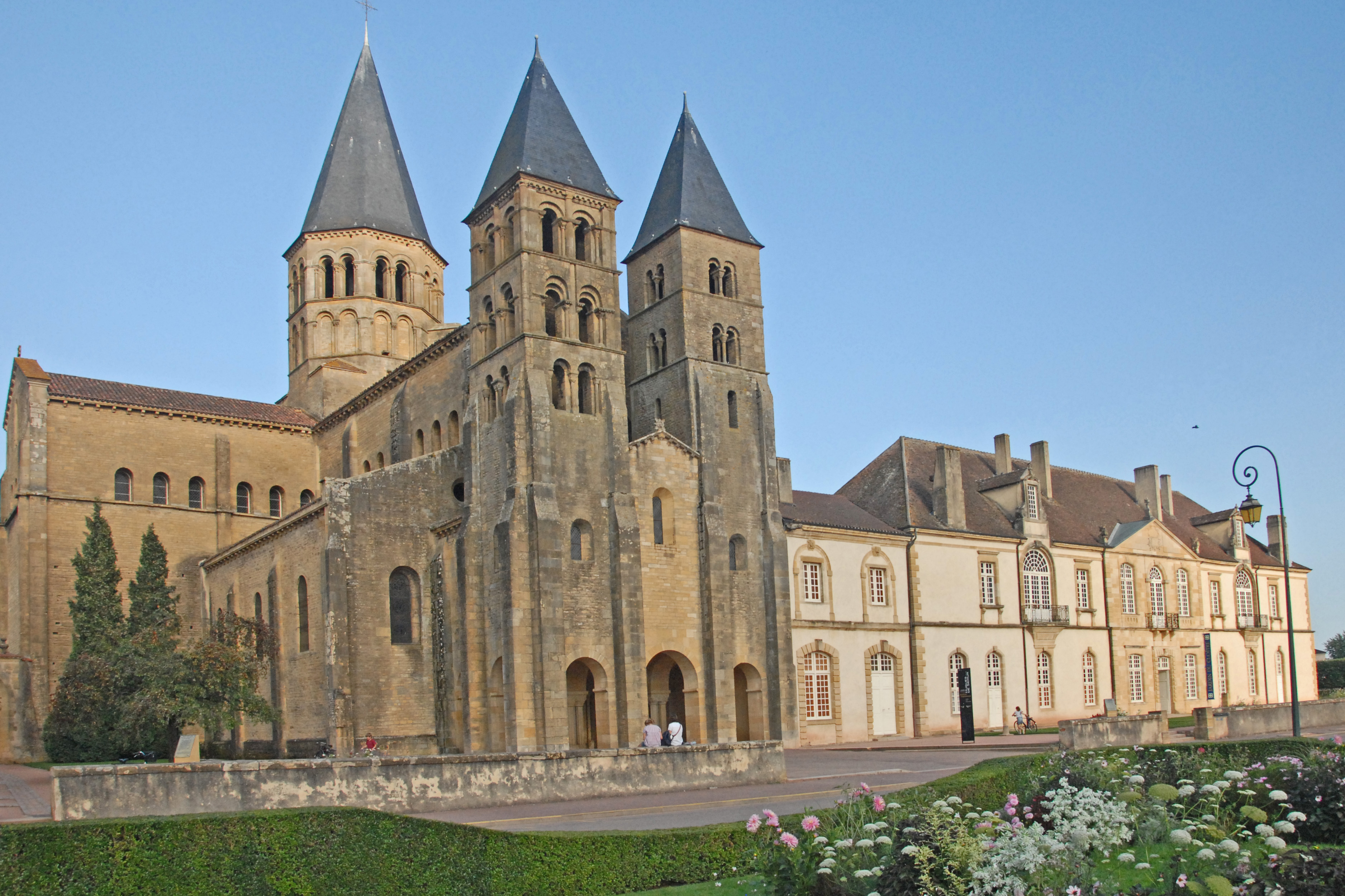 Paray-le-Monial, Abtei von NW